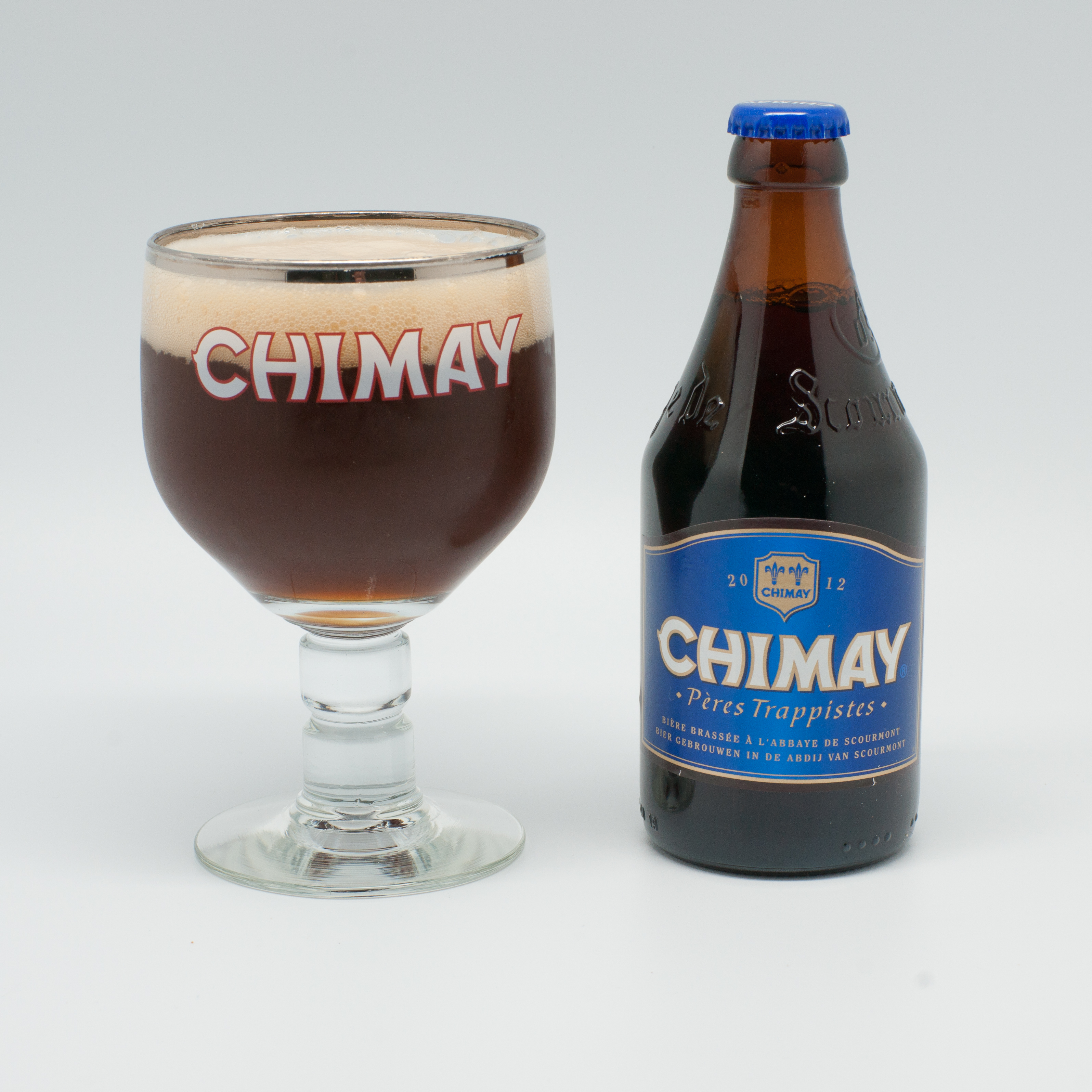 Chimay bleu